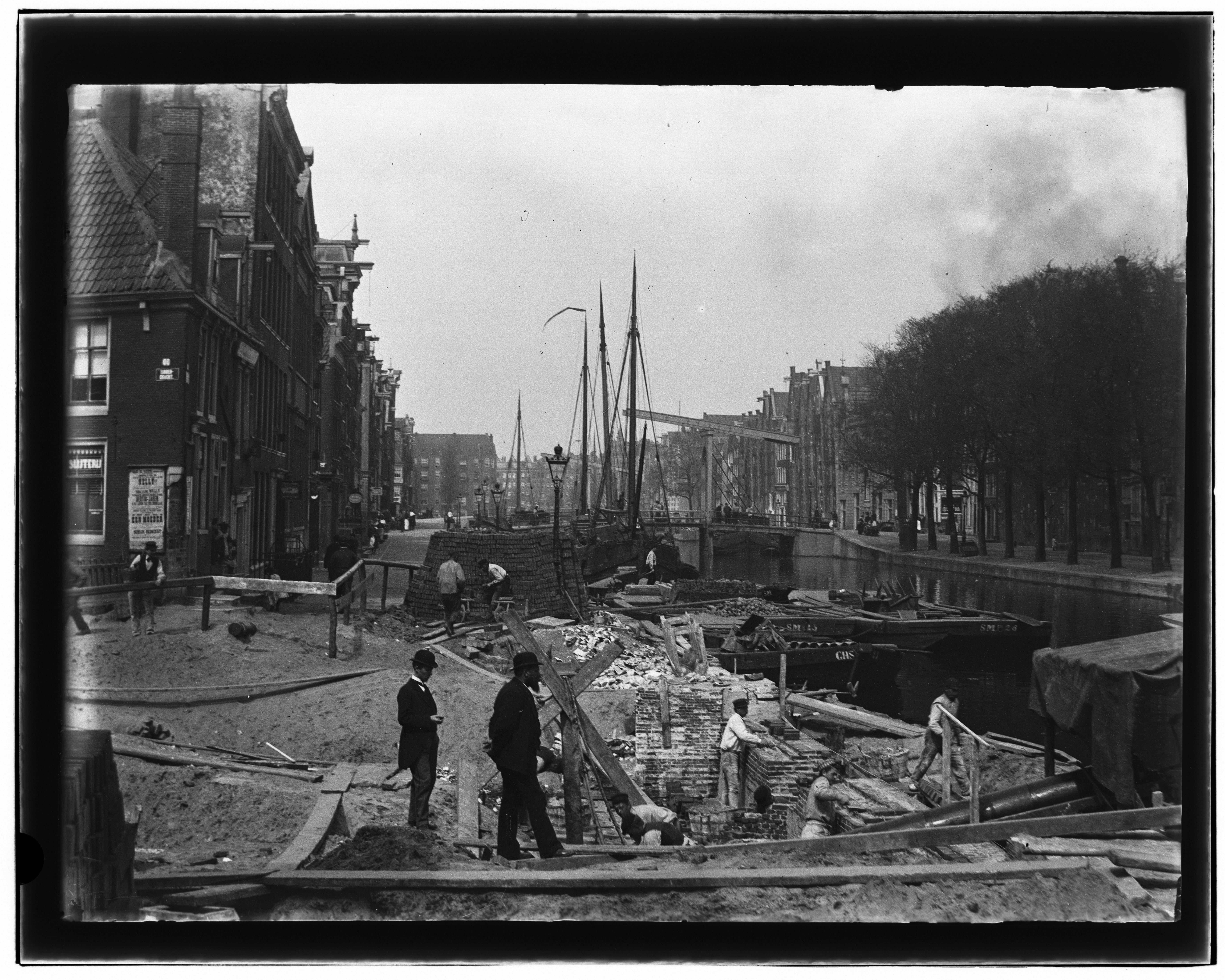 Beschrijving Brouwersgracht ca.200-202-204 enz. (v.r.n.l.) Gezien vanaf Lindengracht (links) richting Marnixstraat. Midden: brug nr.146voor Binnen Oranjestraat Documenttype foto Vervaardiger Olie``, Jacob (1834-1905) Collectie Collectie Jacob Olie Jbz. Datering 1 mei 1896 Geografische naam Brouwersgracht Inventarissen Afbeeldingsbestand 10019A000603 Generated with Dememorixer